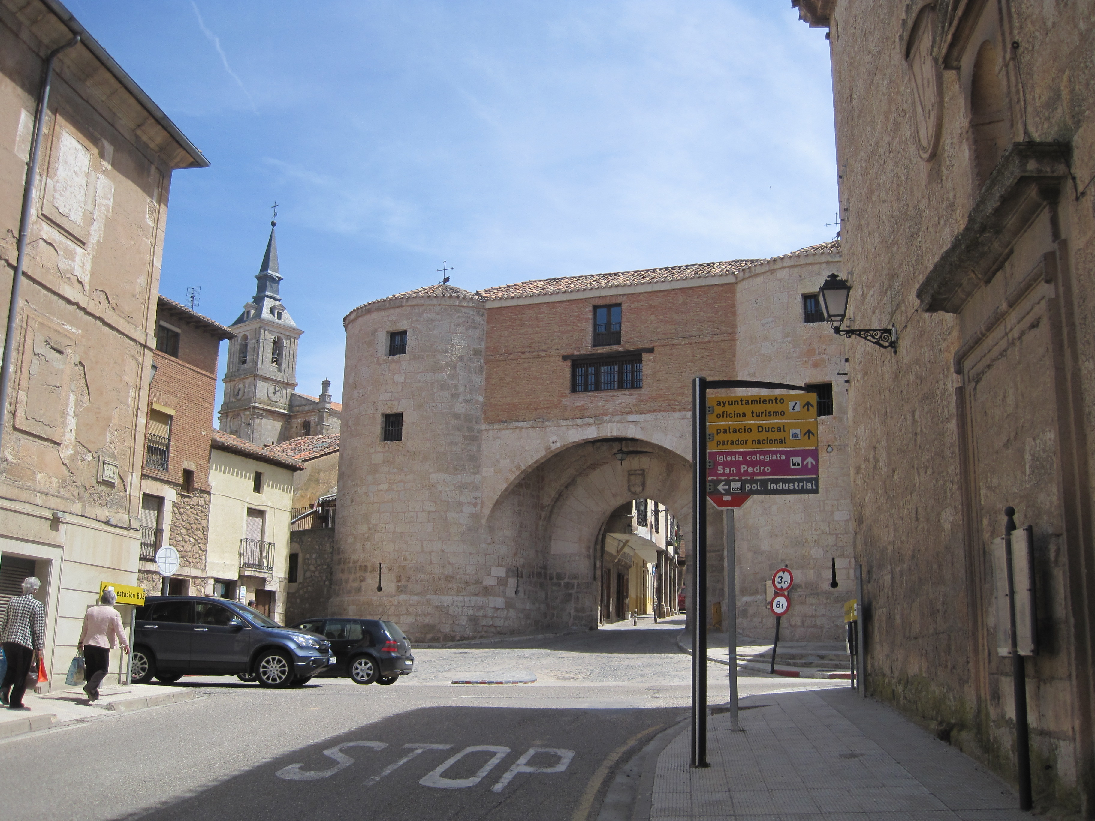 Entrada por la puerta de la cárcel en el casco histórico de Lerma.